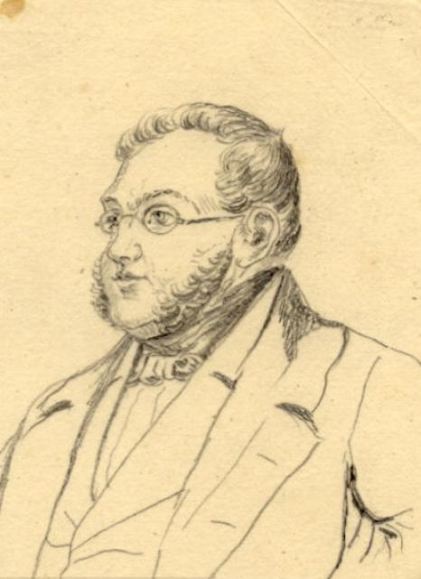 Karl Gisbert Friedrich Freiherr von Vincke (1813–1892), deutscher Dichterjurist und Shakespeare-Forscher. Bleistiftzeichnung, 11,2 cm x 8,5 cm; datiert unten links: "3 April 49", auf der Rückseite: "v. Vincke"